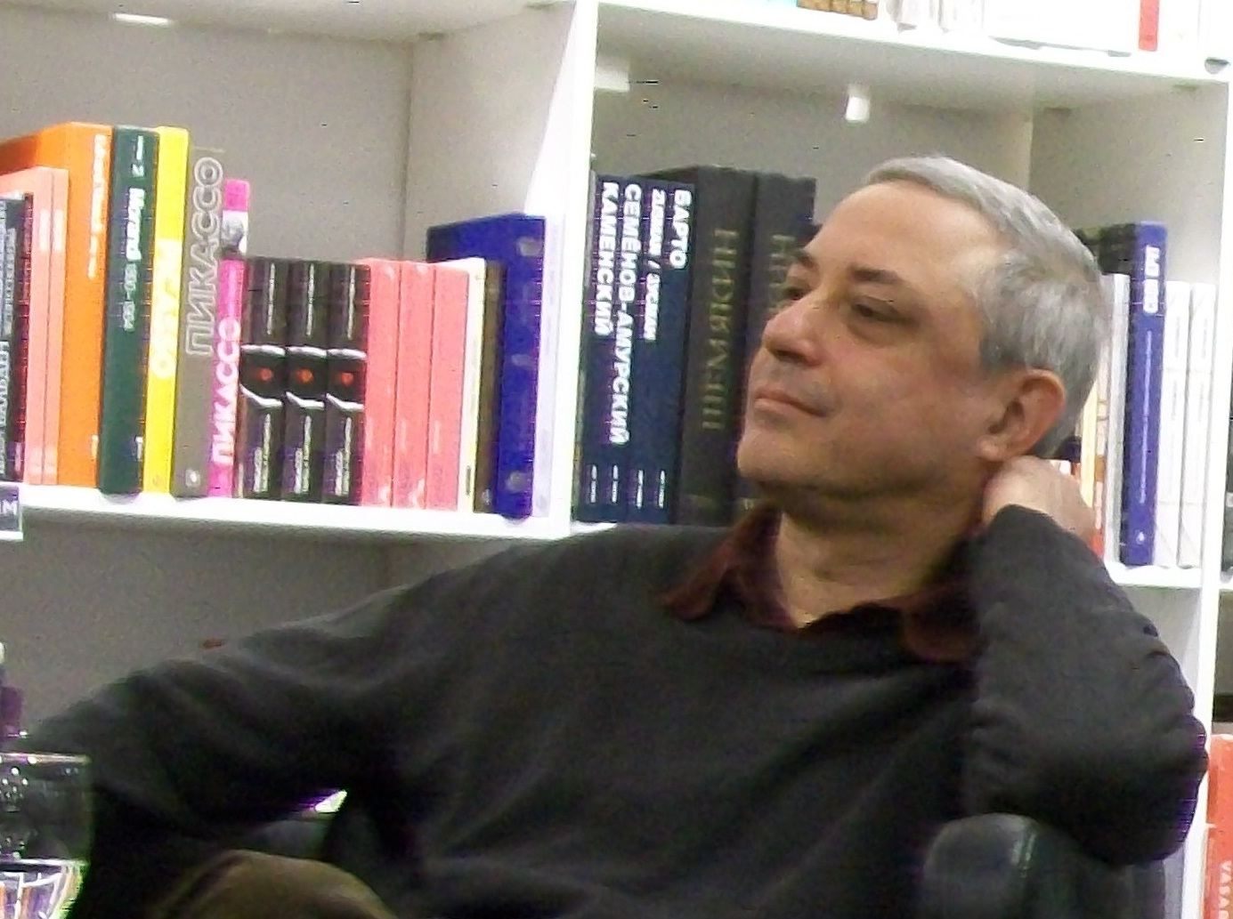 Евгений Львович Чижов в Ельцин-центре, 21 апреля 2017 года